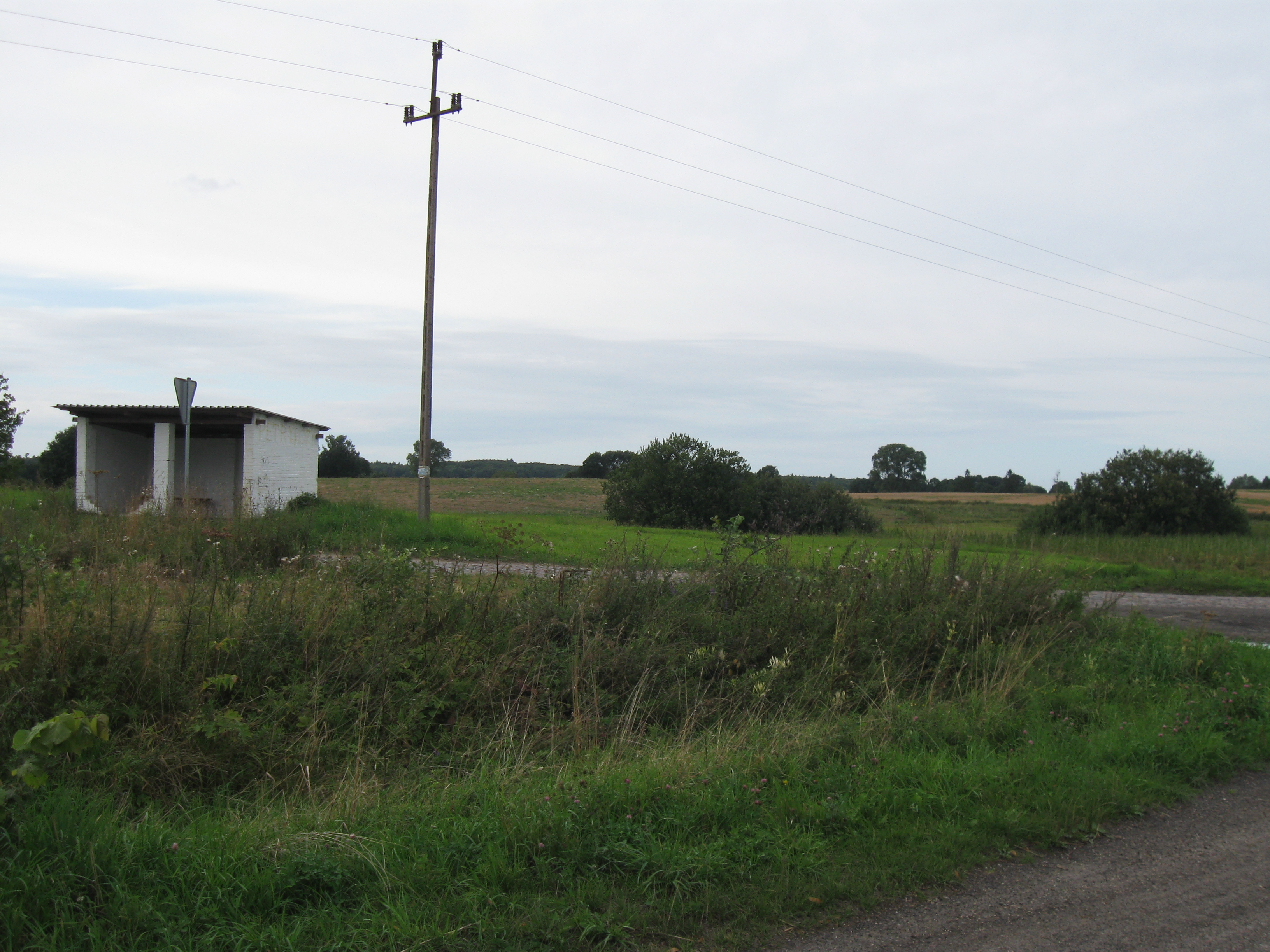 Skrzyżowanie do Petrykóz (ok. 1 km na wschód od wsi) - widoczny przystanek autobusowy